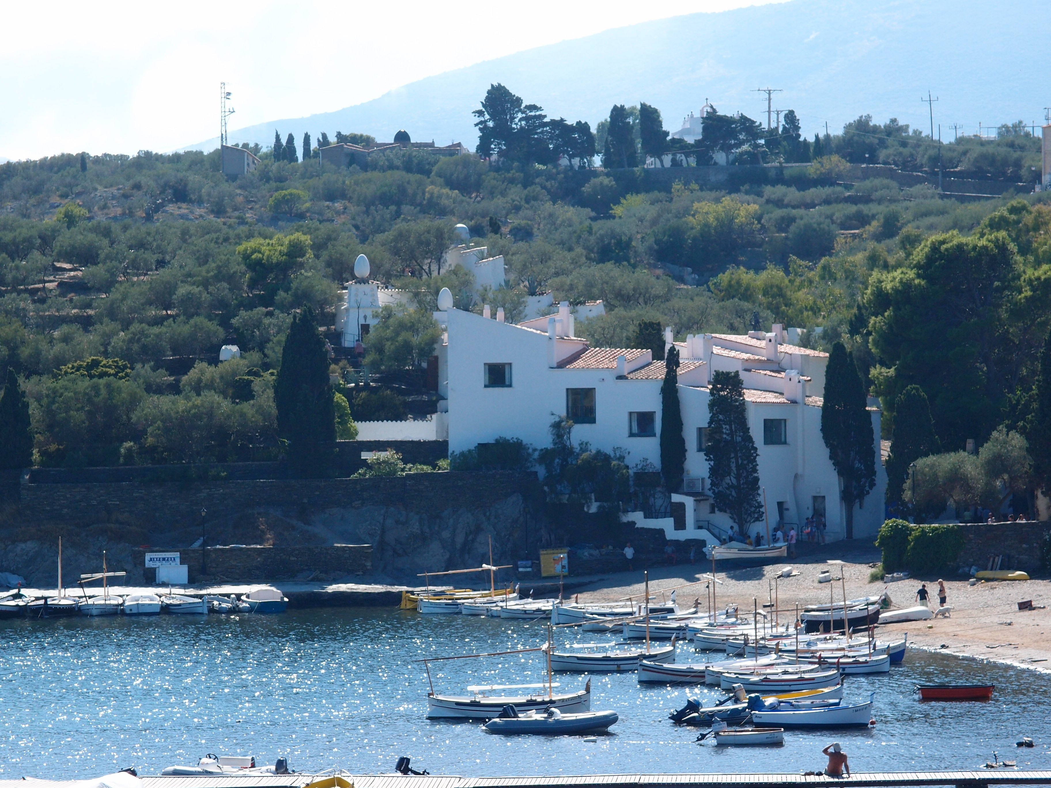 Portlligat / Salvador Dalís Wohnhaus, heute Museum (Alt Emporda / Katalonien) Datum: 04.09.2013 Urheber: M. Pfeiffer alias Benutzer:Gordito1869 Quelle: privates Fotoarchiv des Urhebers